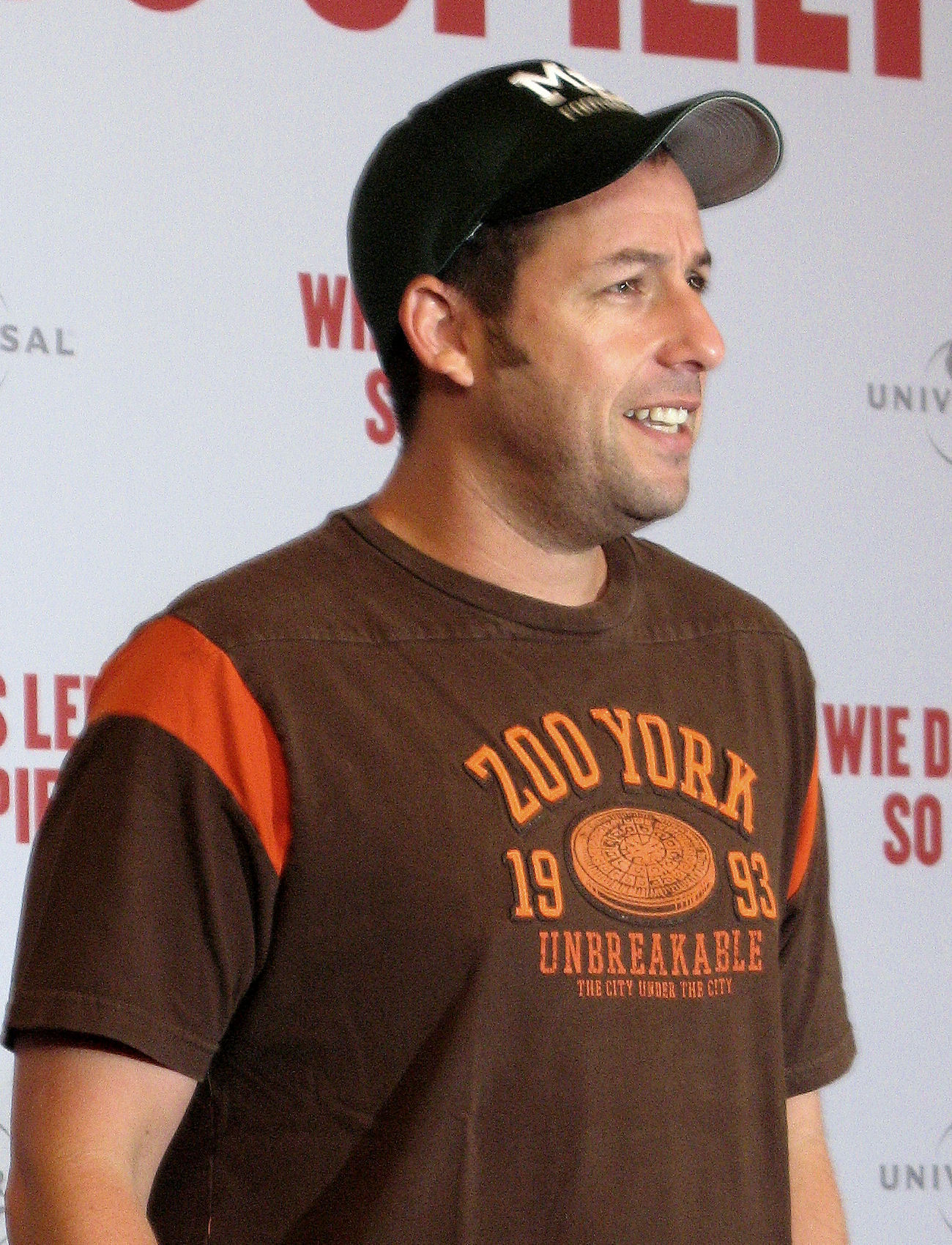 Adam Sandler in Berlin, 26.08.2009